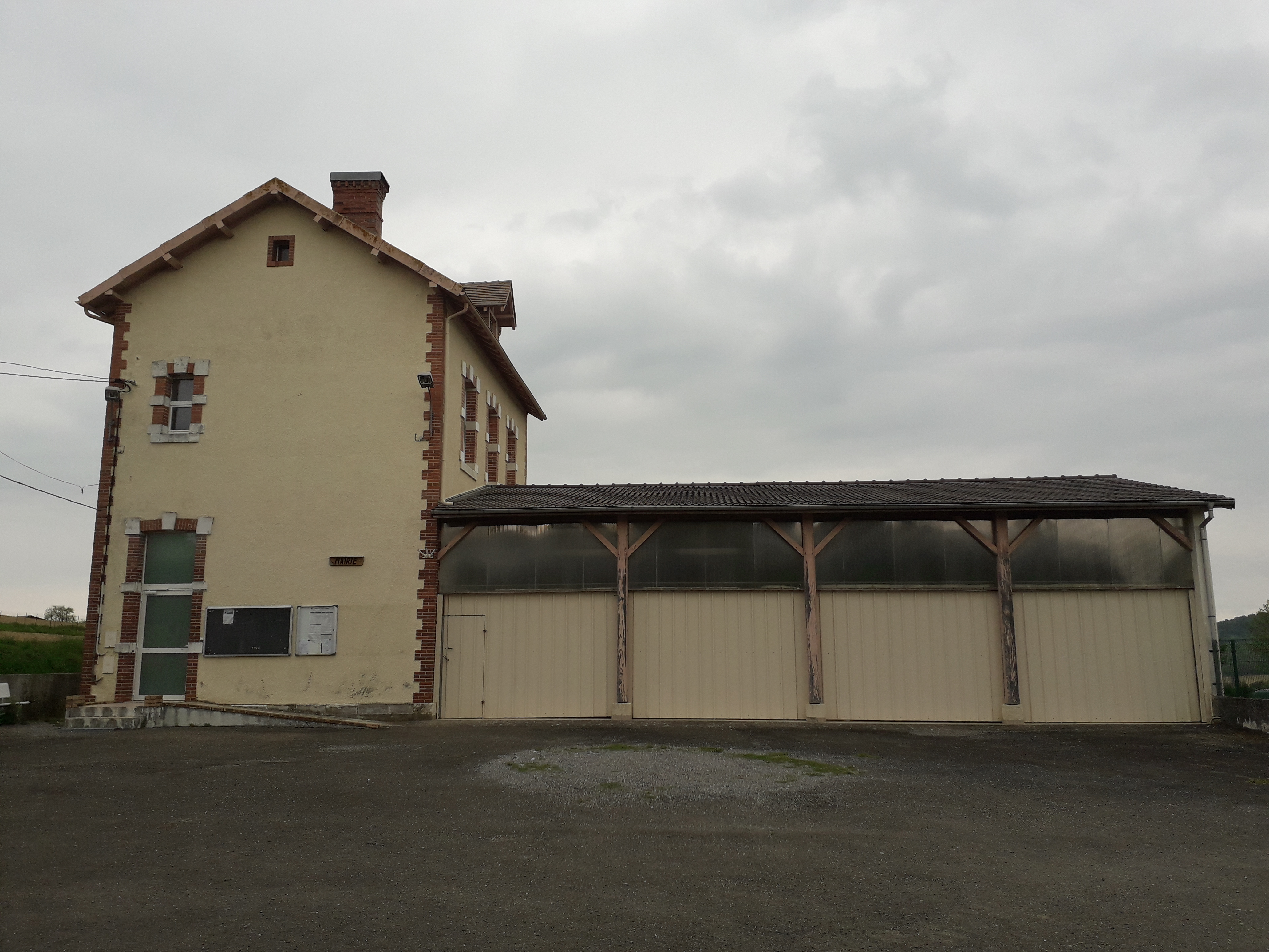 Mairie et salle des fêtes de Gayon